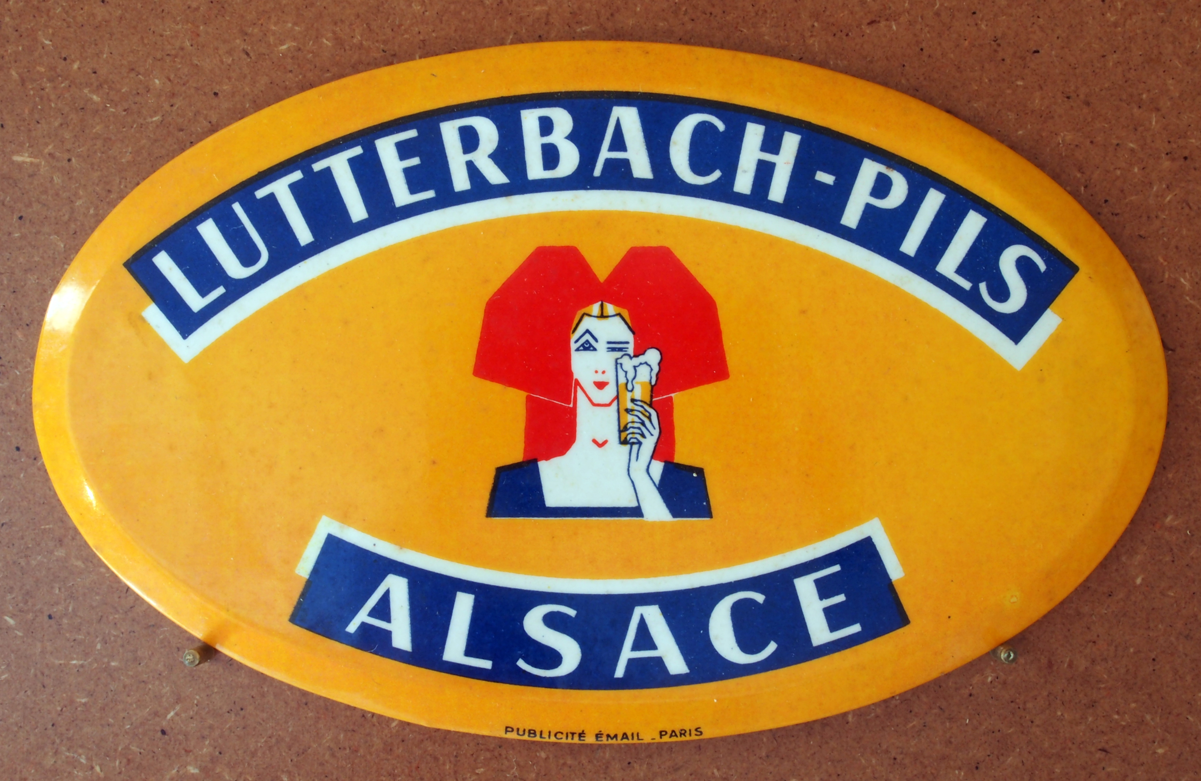 Lutterbach-Pils Alsace , enamel advertising sign at the Musée Européen de la Bière.